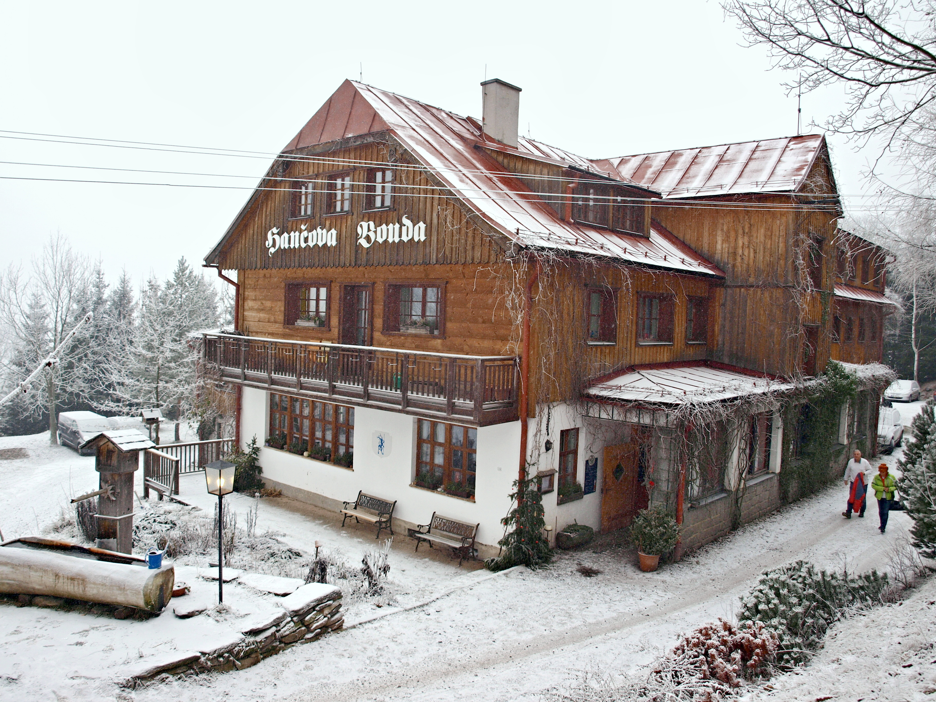 Krkonoše, Benecko